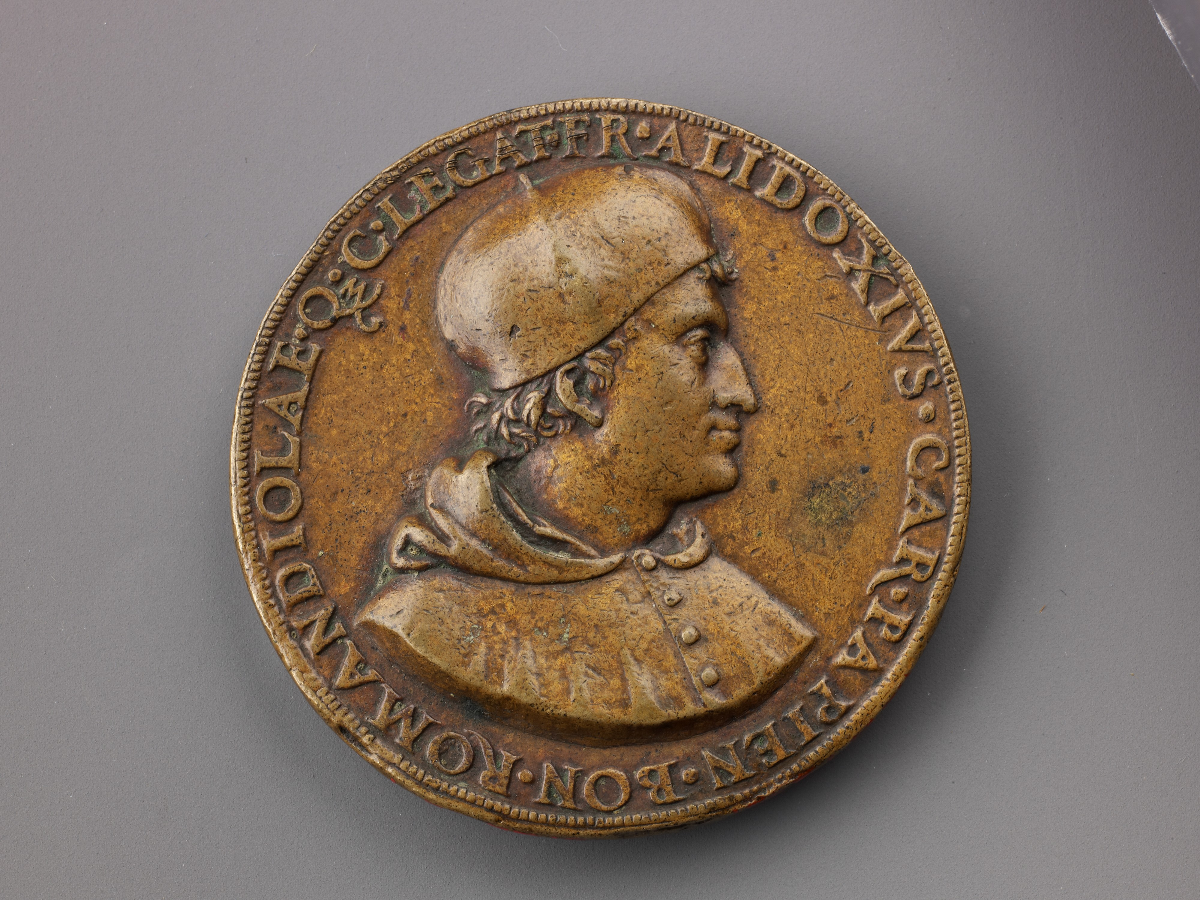 Medal; Medals